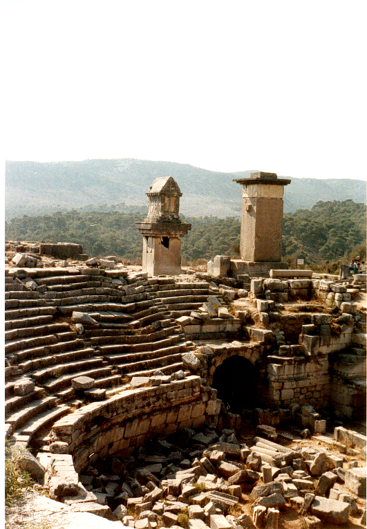 Römisches Theater mit dem lykischen Pfeilersarkophag und dem Harpyienmonument